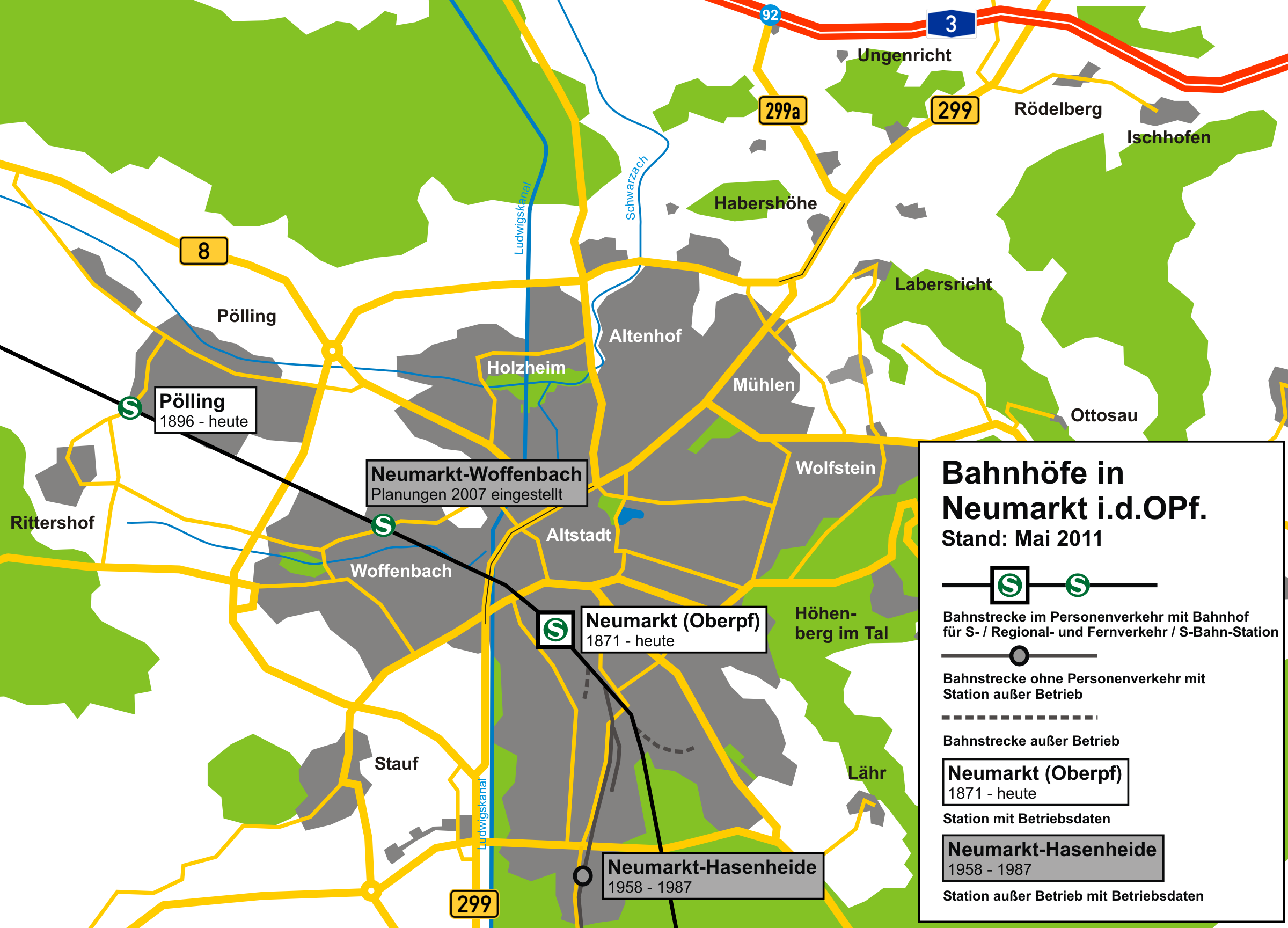 Übersicht über die Bahnhöfe und Haltepunkte in Neumarkt in der Oberpfalz